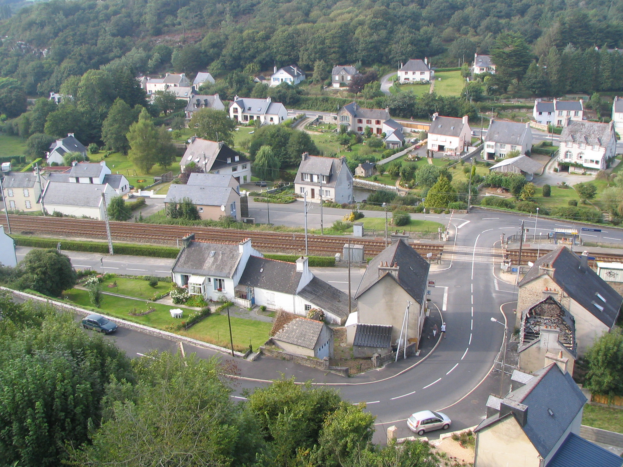 Vue sur la commune de la Roche-Maurice depuis le château